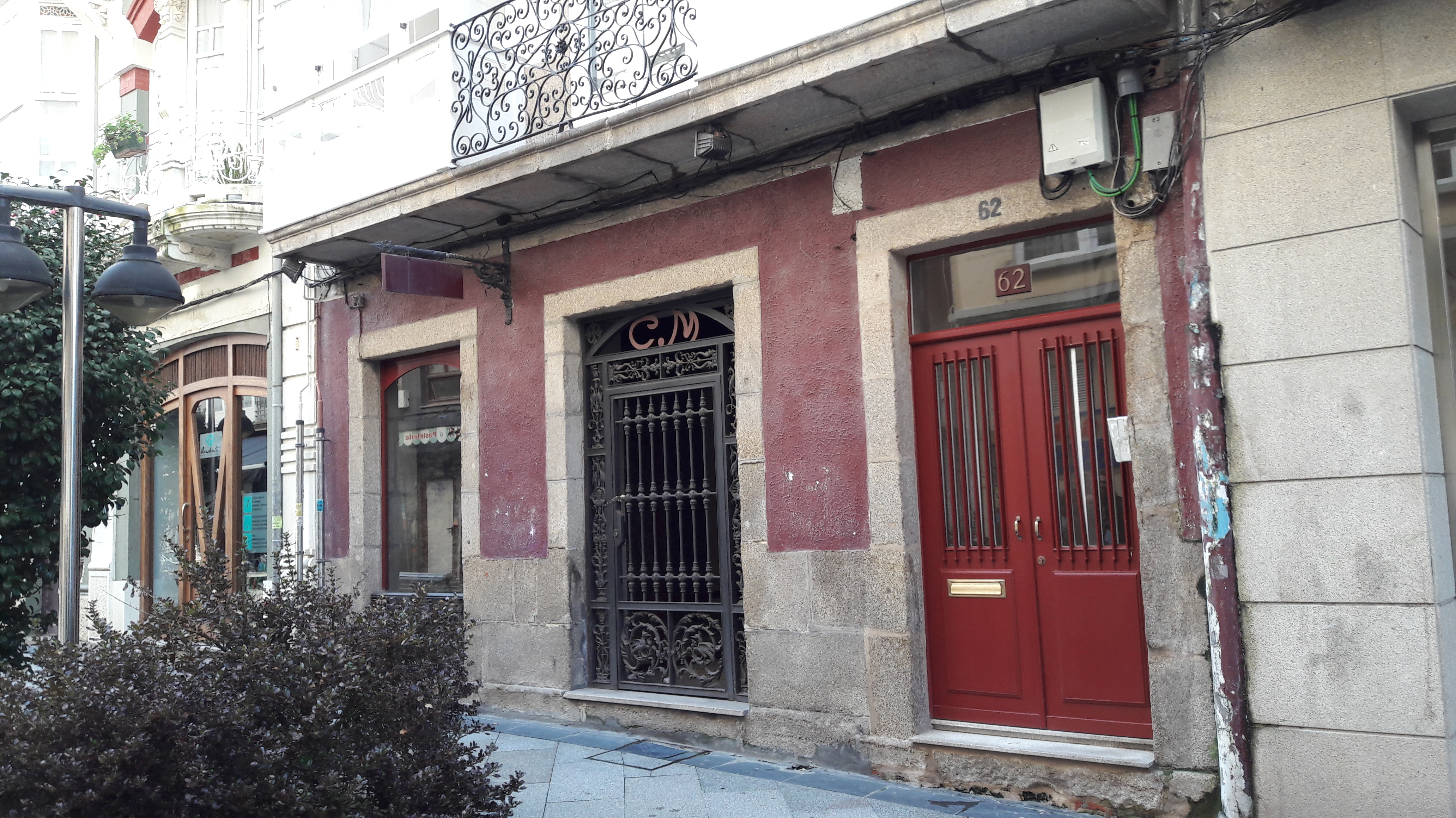 Antiga sede do coro Toxos e Froles na rúa Dolores de Ferrol